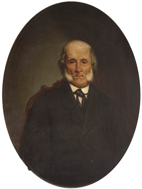 oleo de Prilidiano Pueyrredón